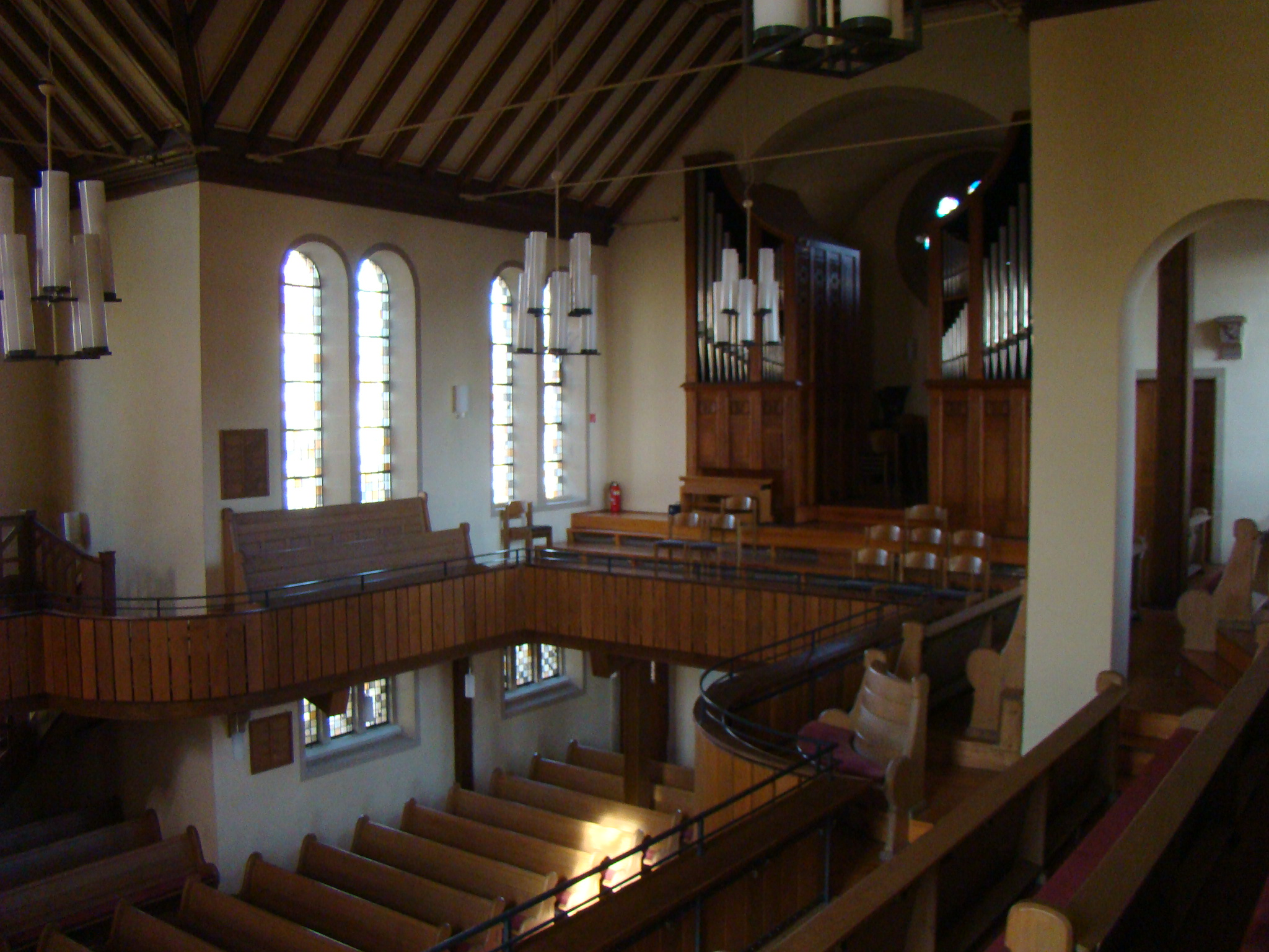 Johanneskirche in Untergruppenbach, Blick über die Empore zur Orgel. Foto: Peter Schmelzle (November 2011).